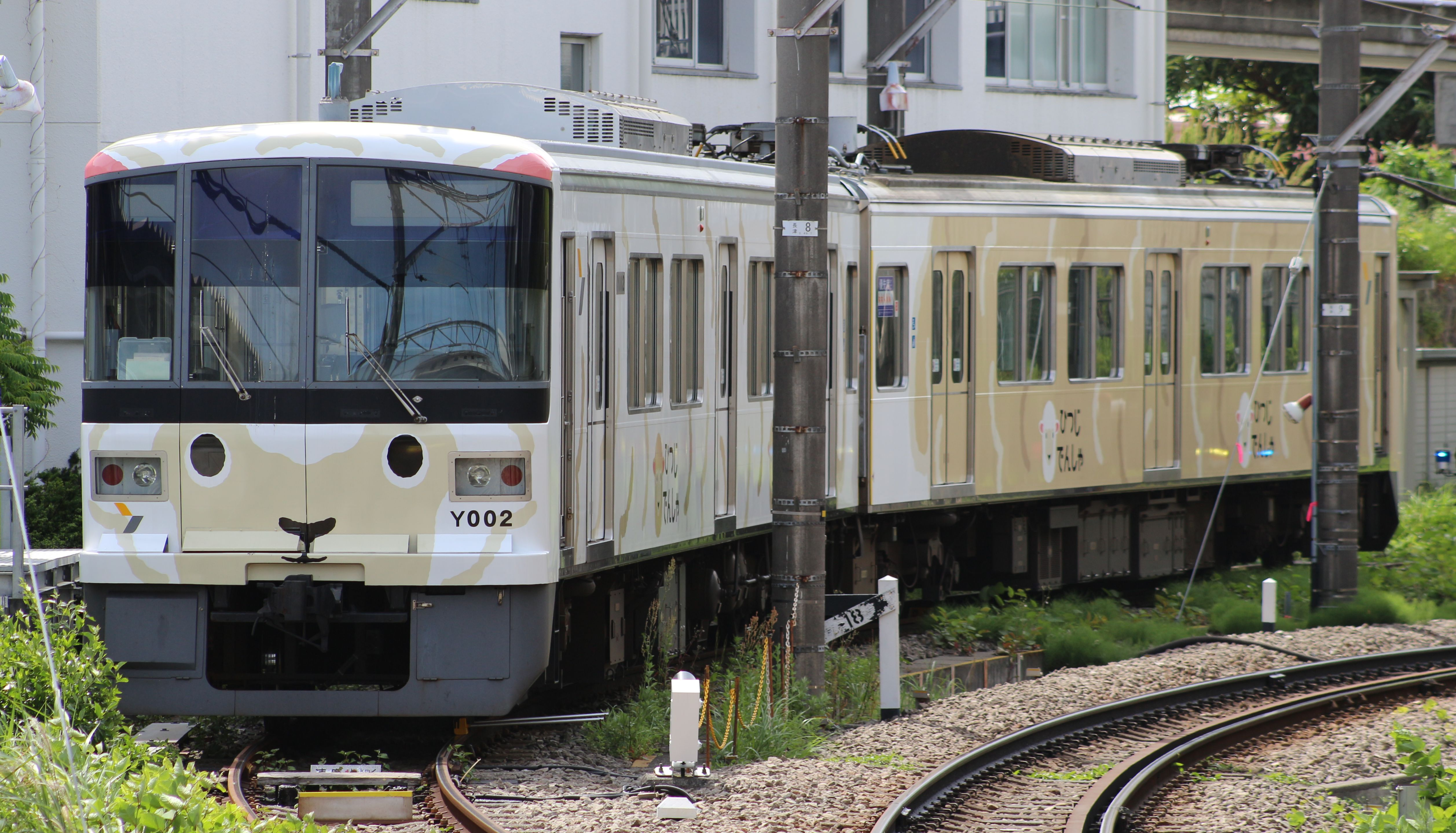 横浜高速鉄道Y000系Y002編成「ひつじでんしゃ」（長津田駅にて）